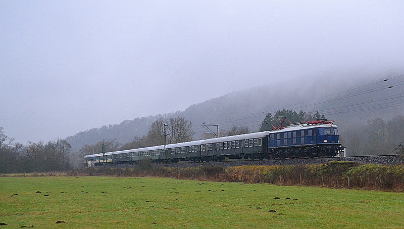 Die Museumslokomotive E18 047 mit einem Sonderzug der Eisenbahnfreunde Treysa bei Niederscheld.